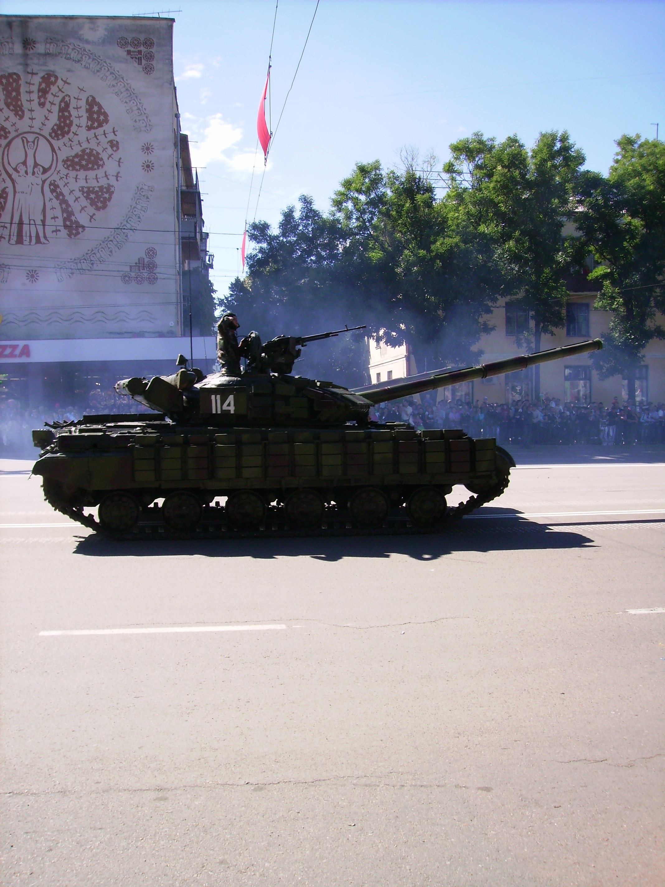 Военный парад на площади им. А.Суворова в честь 20-ти летия независимости ПМР. Так как 20-ть лет круглая дата, то в праде принимала участие военная техника (как и в параде в честь 15-ти летия независимости ПМР).